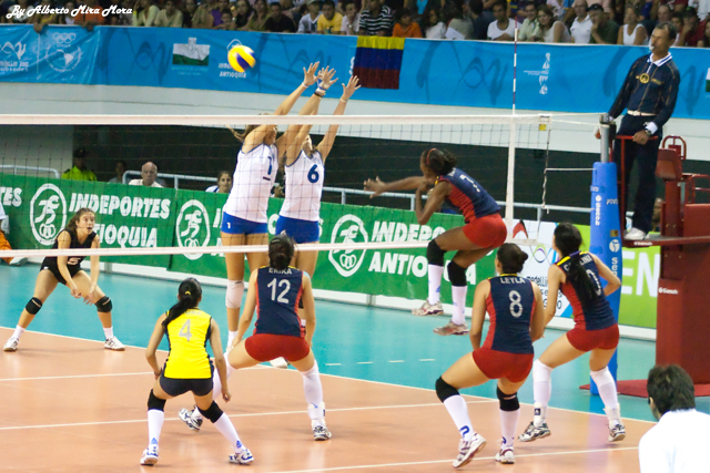 Voleibol en los Juegos Sudamericanos de 2010. Uruguay vs Colombia.